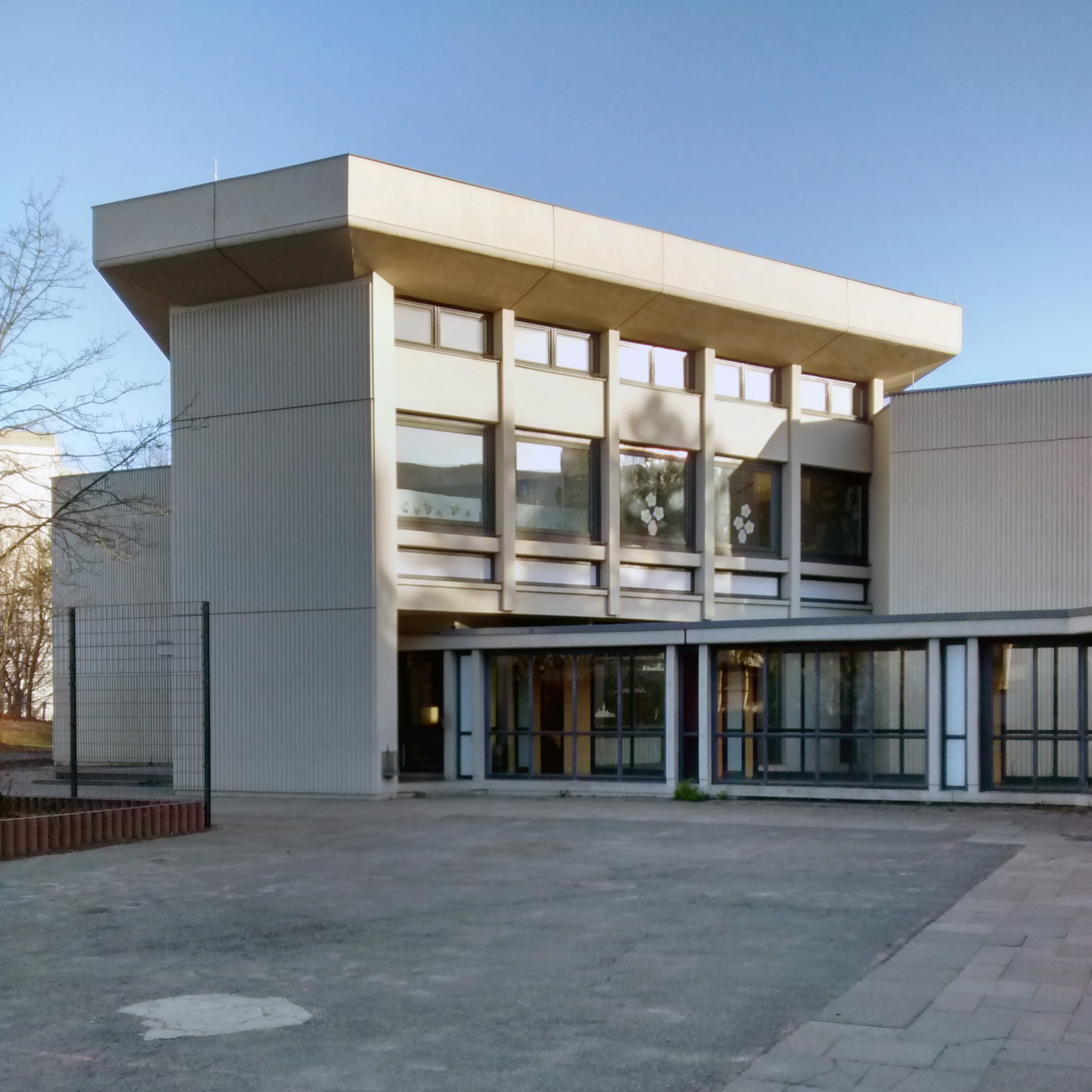 Walter-Gropius-Schule, Walter Gropius und The Architects’ Collaborative (TAC), 1965–1969 Fritz-Erler-Allee, Gropiusstadt, Britz/Buckow/Rudow, Berlin-Neukölln